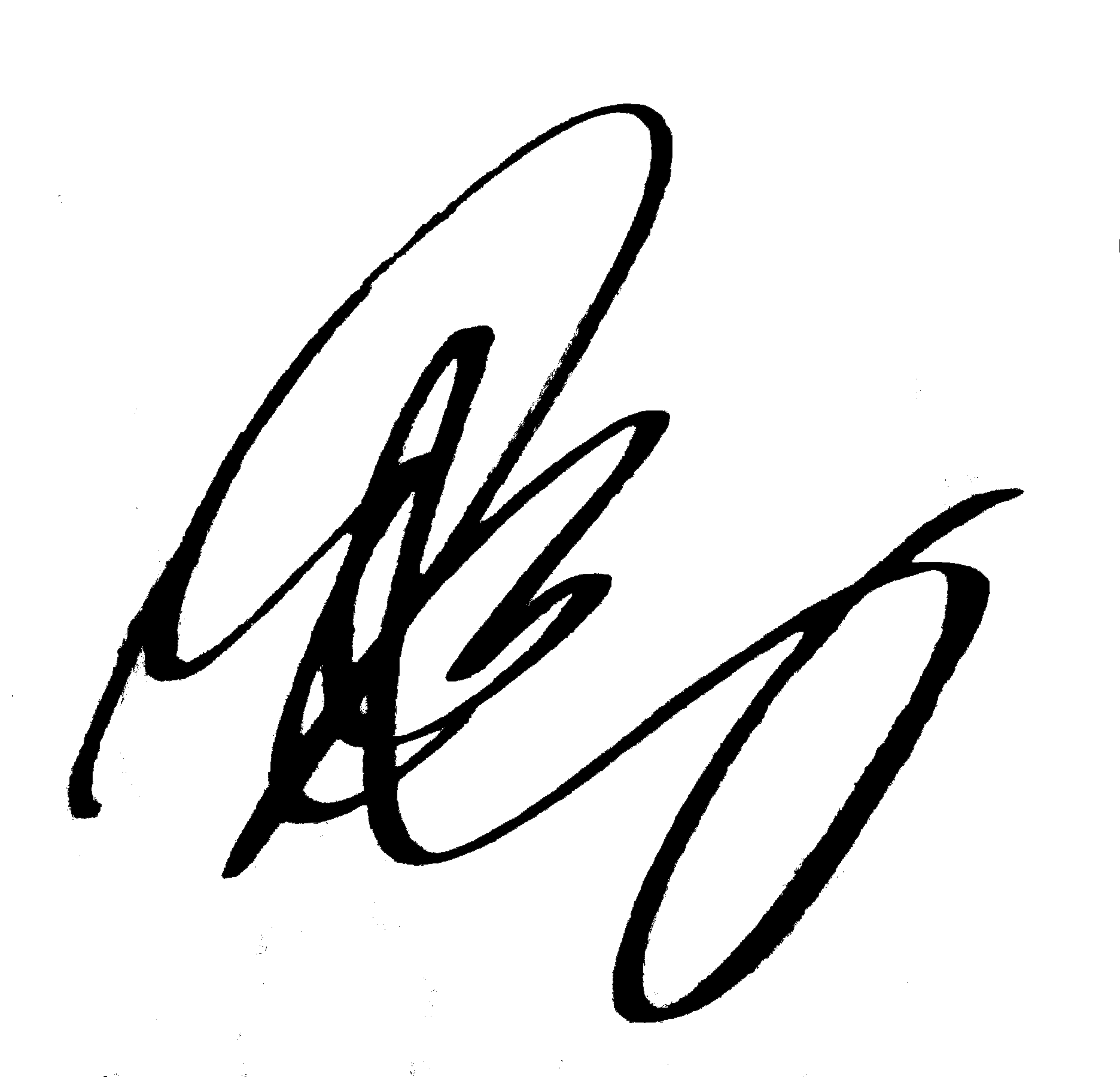 夢見照うたサイン